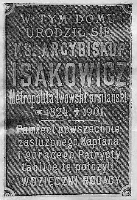 Tablica upamiętniająca abp. Izaaka Mikołaja Isakowicza na jego domu rodzinnym we Lwowie (1905)